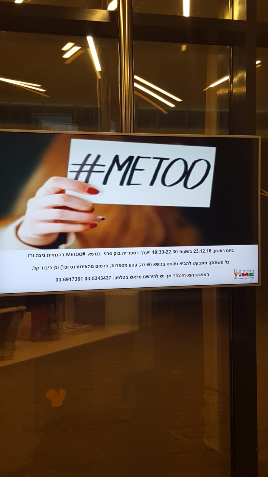 סרף בספריית גני תקווה